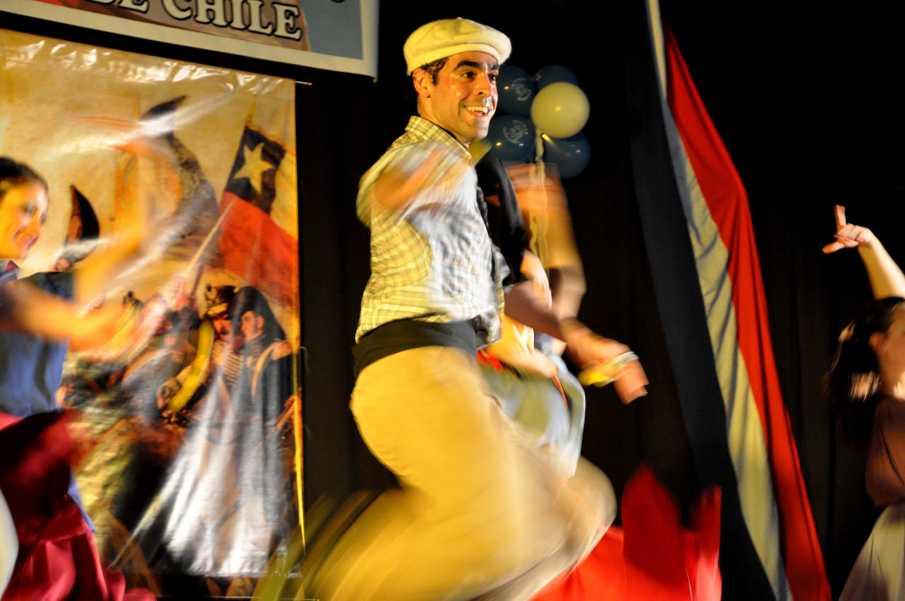 Bicentenaire 1810-2010, Dia Nacional del Chile, 18 septembre 2010, Soirée de l'Association des résidents chiliens Gabriela Mistral de Ushuaia. Spectacle de Gauchos.